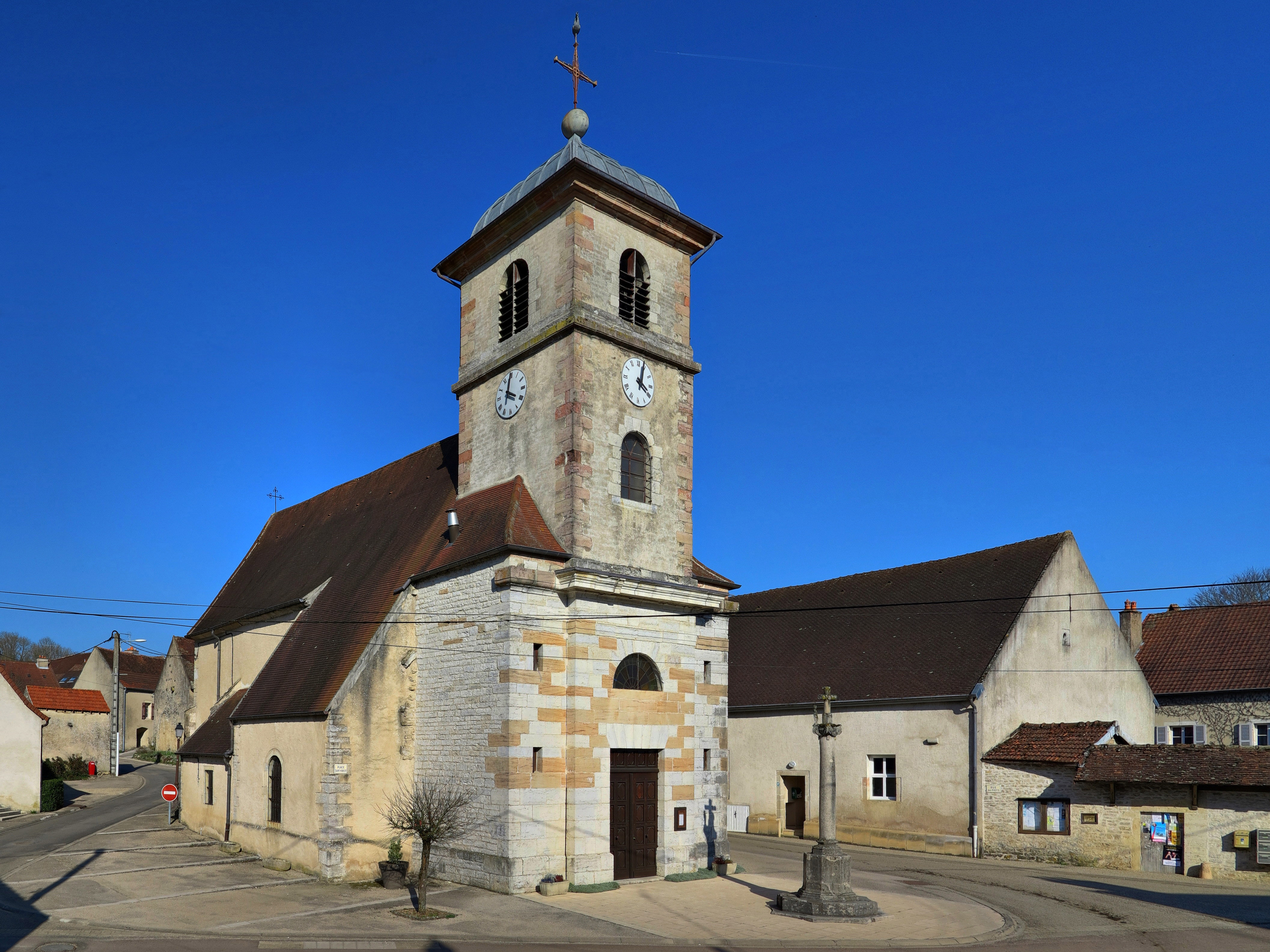 L'église Saint Hubert